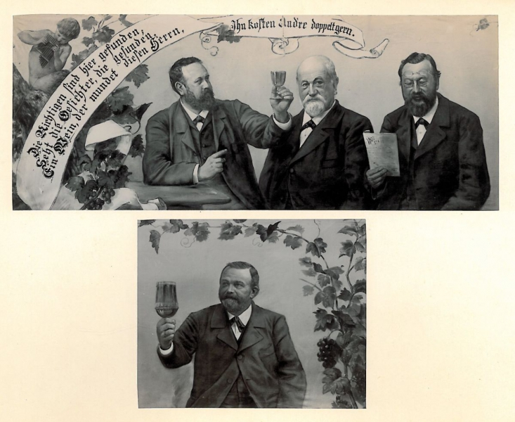 Fotografien von Gemälden des Malers Ernst Bader, die Heilbronner Persönlichkeiten zeigen und vermutlich bei der Gewerbeausstellung in Heilbronn 1897 als Dekoration dienten. Dargestellt hier: Küfer Karl Strohmeier, Likörfabrikant Ludwig Landauer, Rentner Wilhelm Bauer, unten Kronenwirt Rudolf Neher